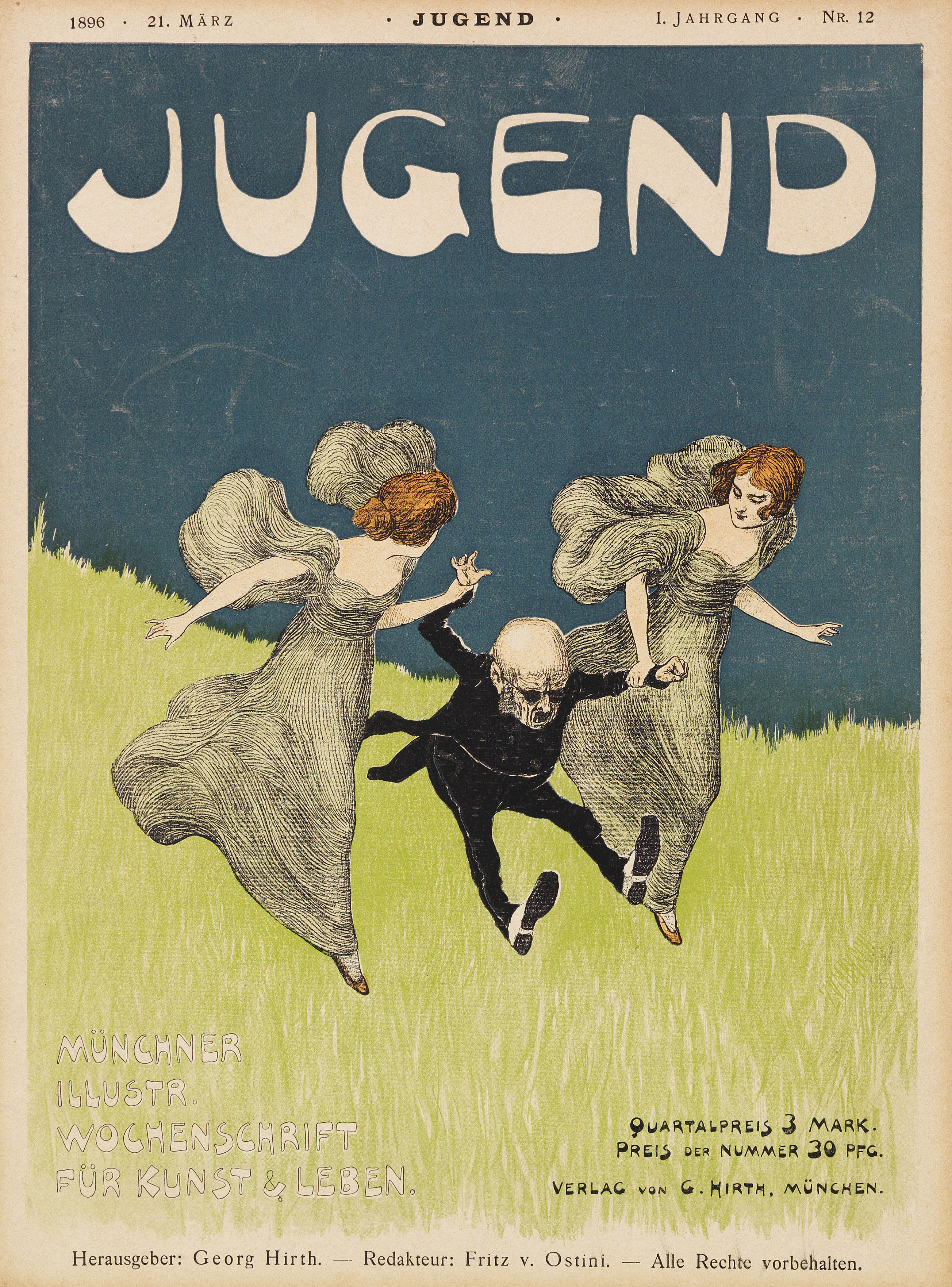 Titelblatt der Zeitschrift "Jugend. Münchner illustrierte Wochenschrift für Kunst und Leben", 1896, I. Jg.: Nr. 12 (21. März)